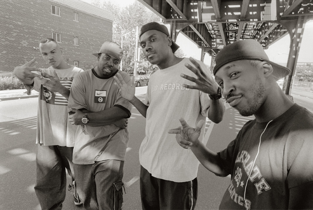 Hip Hop Dj bandThe X-Ecutioners in the Bronx/NYC near Roc Raidas home